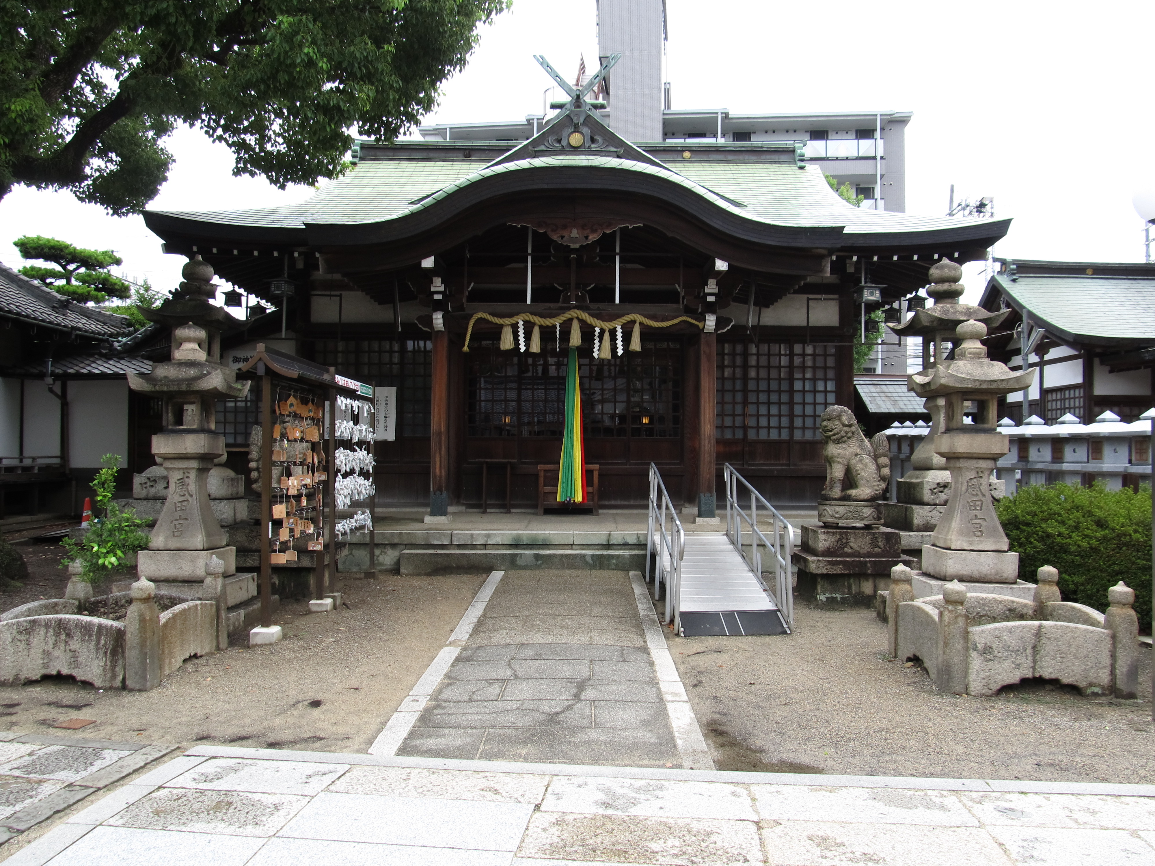 大阪府貝塚市にある感田神社の拝殿。